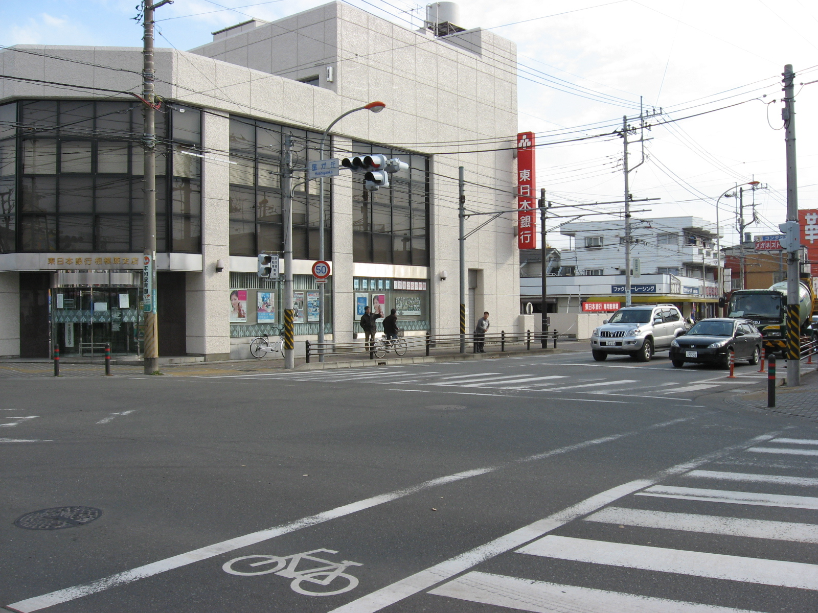 神奈川県道507号相武台相模原線の星ヶ丘交差点